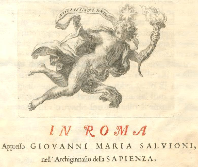 «Novissimus exit» - Marca tipografica di Giovanni Maria Salvioni